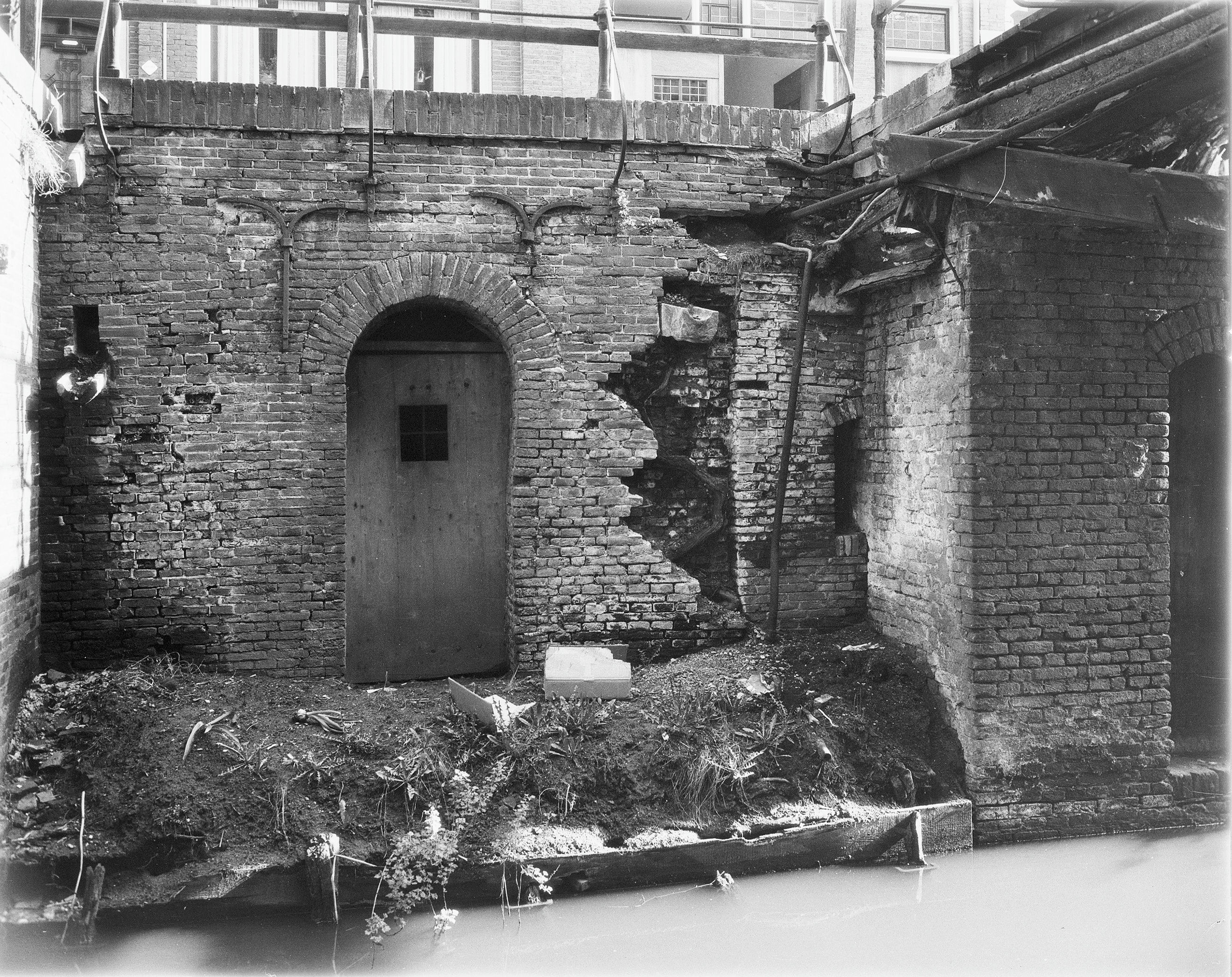 Utrecht: tussen de bruggen van Kromme Nieuwegracht 43 en 45. Walmuur, walstoep, balie